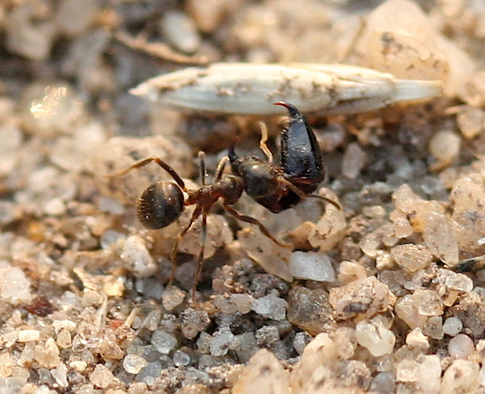 Formicidae - Lasius niger